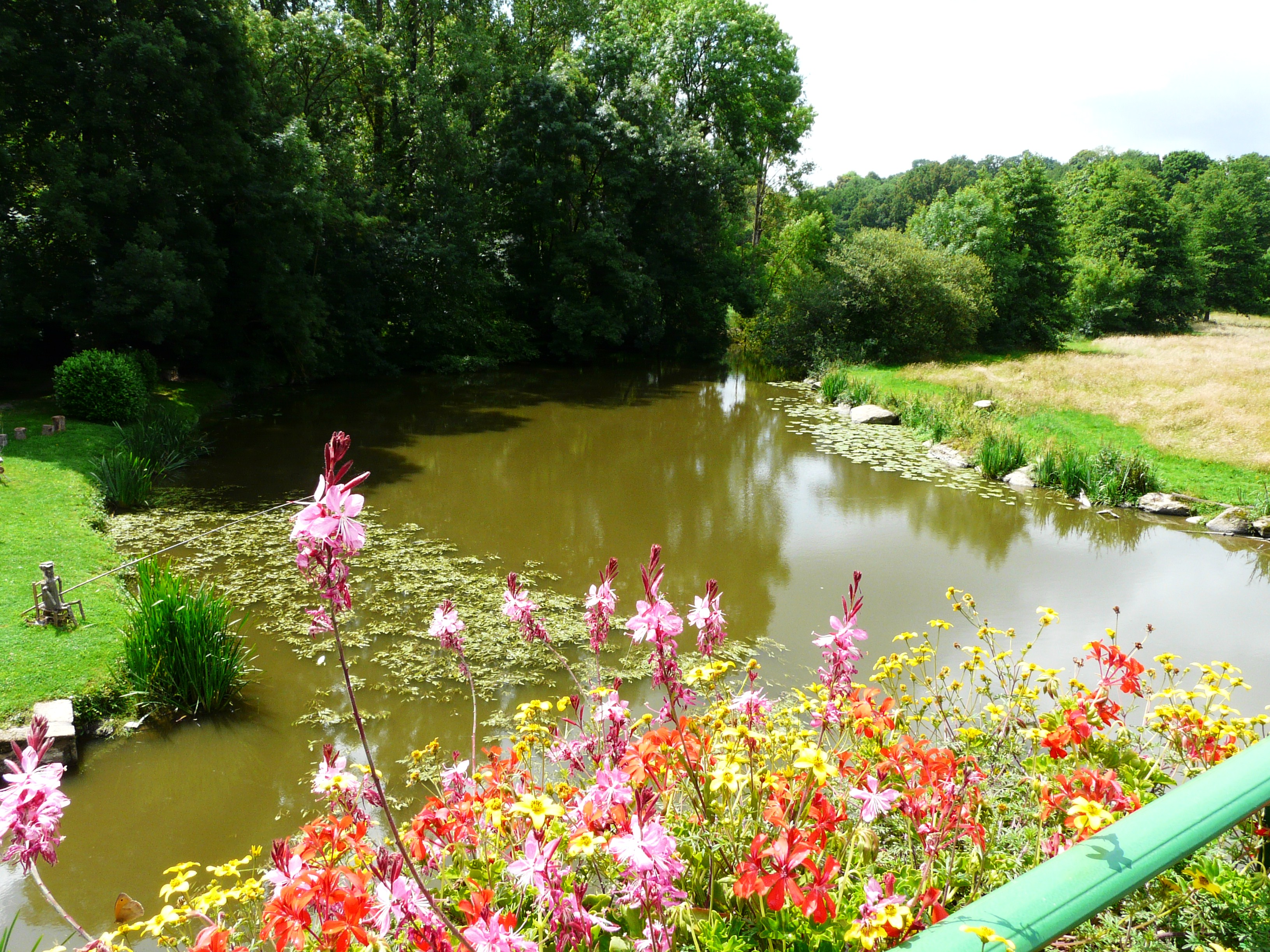 La Sèvre nantaise en amont du pont de Mallièvre, en limites de Mallièvre (à gauche) et Les Epesses (à droite), Vendée, France